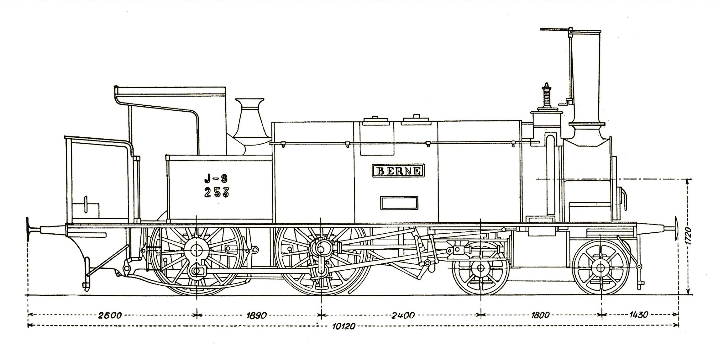 Tenderlokomotive Nr. 3 „Berne“ von 1862 Ec 2/4 der Lausanne–Freiburg–Bern-Bahn (LFB) für gemischten Dienst mit Satteltank für den Wasservorrat